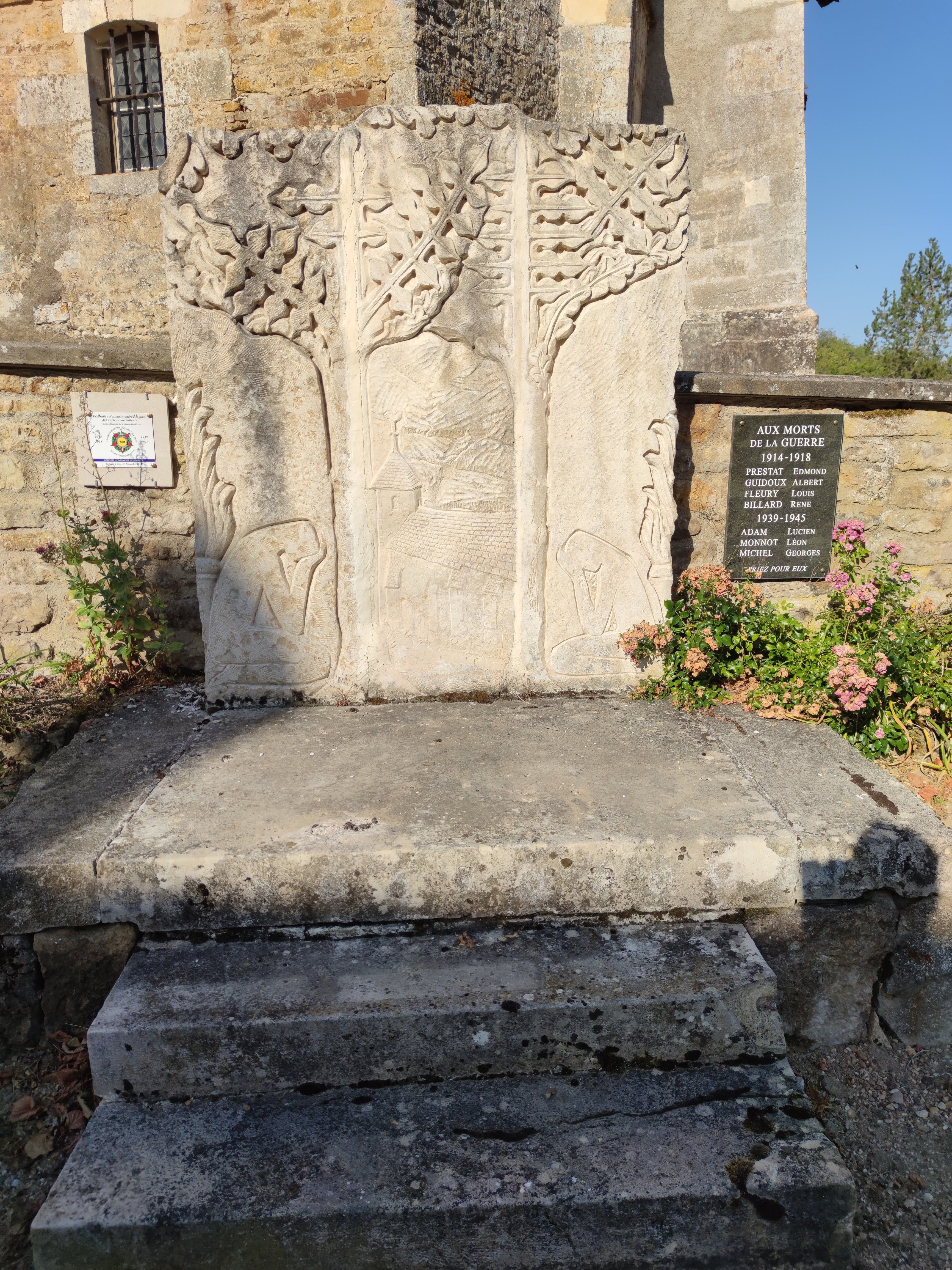 Monument aux morts de Parigny-la-Rose (Nièvre).